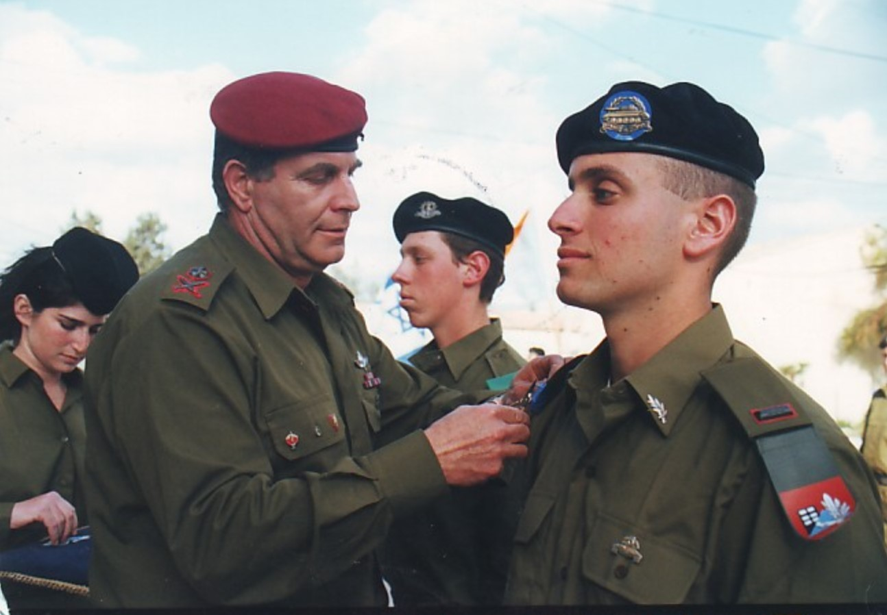 מפקד פיקוד העורף שמואל (שמוליק) ארד מעניק דרגה לקצין מצטיין בסיום תרגיל קורס קציני חילוץ.